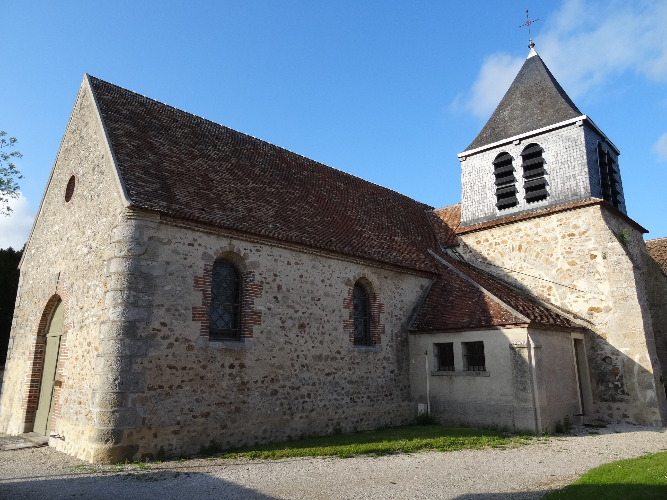 Église Notre-Dame de Noyen-sur-Seine. (Seine-et-Marne, région Île-de-France).